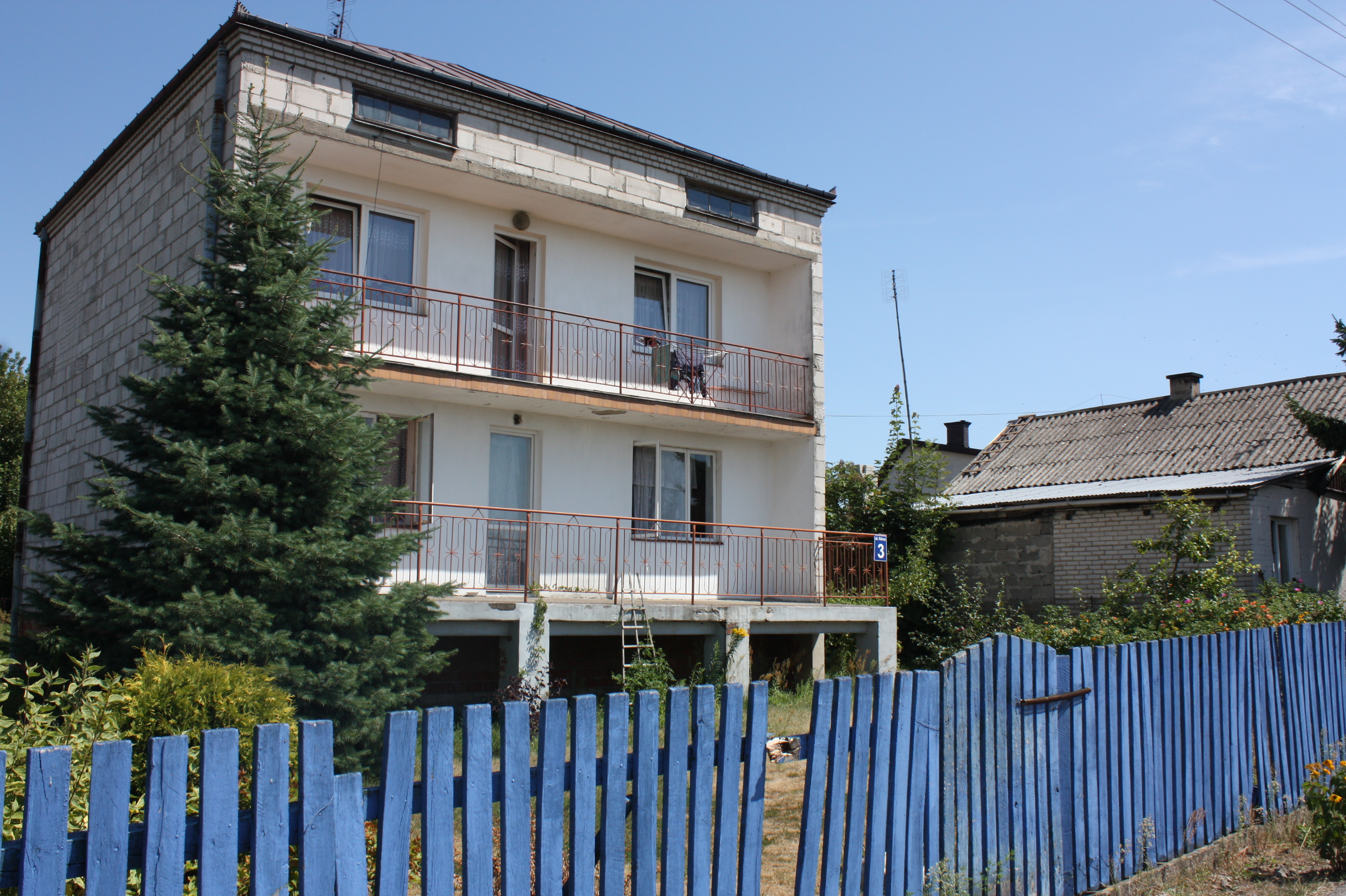 Dom w Jeruzalu "odgrywający" rolę Biura Senatora Kozioła